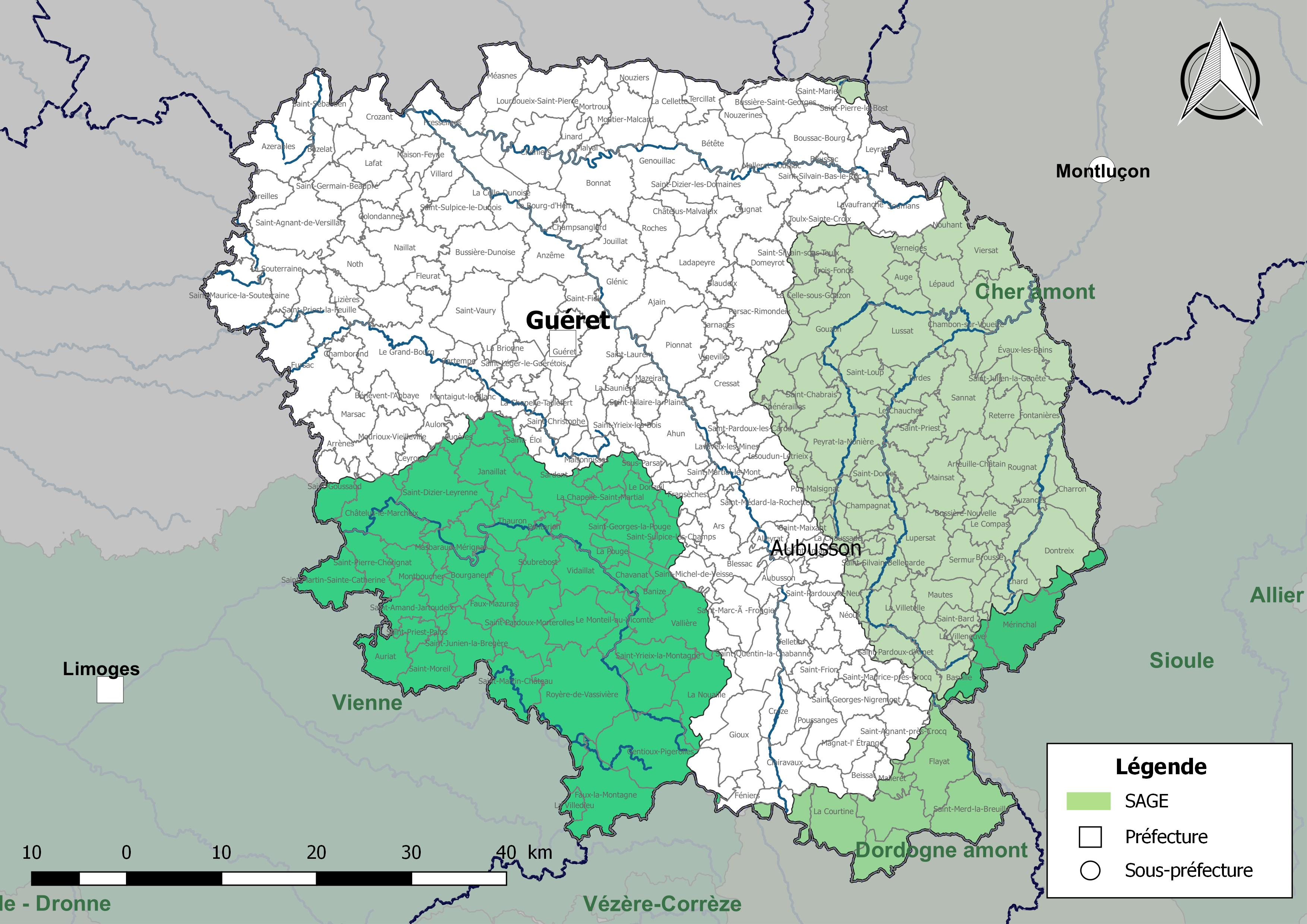 Carte des schémas d'aménagement et de gestion des eaux (SAGE) concernant le département de la Creuse (France) au 1er janvier 2018.